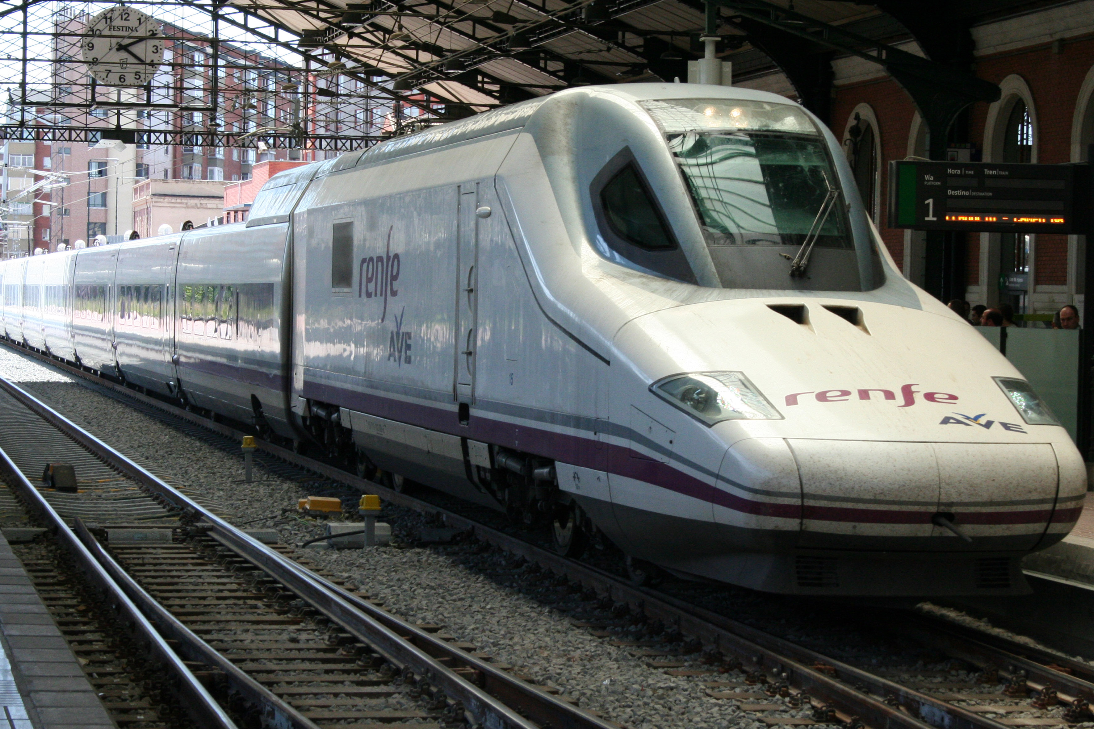 AVE (serie 102) llegando a Valladolid